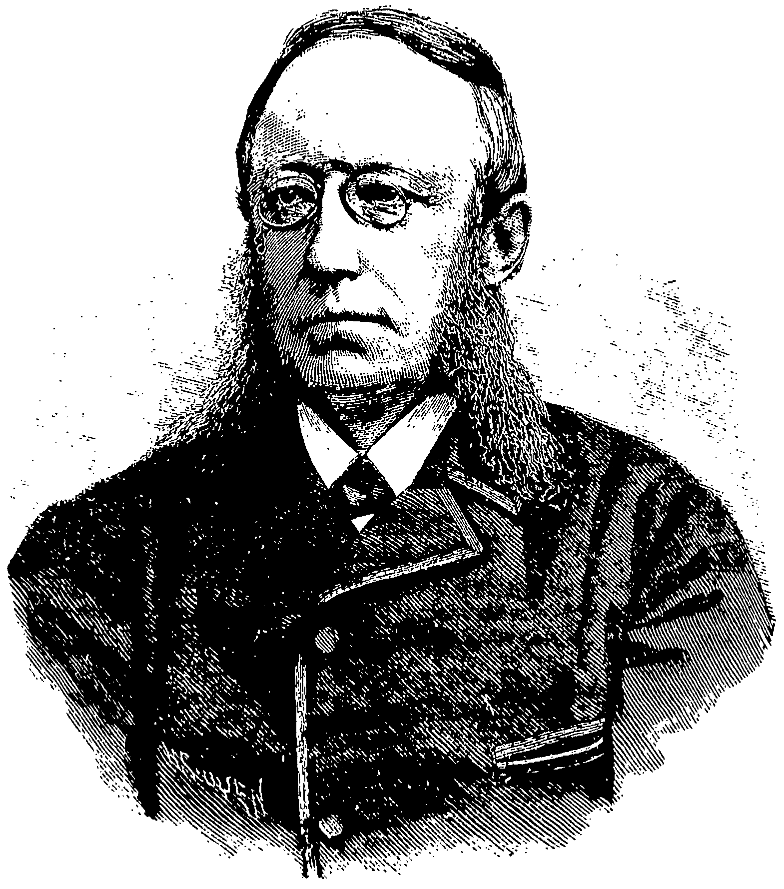 Den norske embetsmannen Jacob Stang.